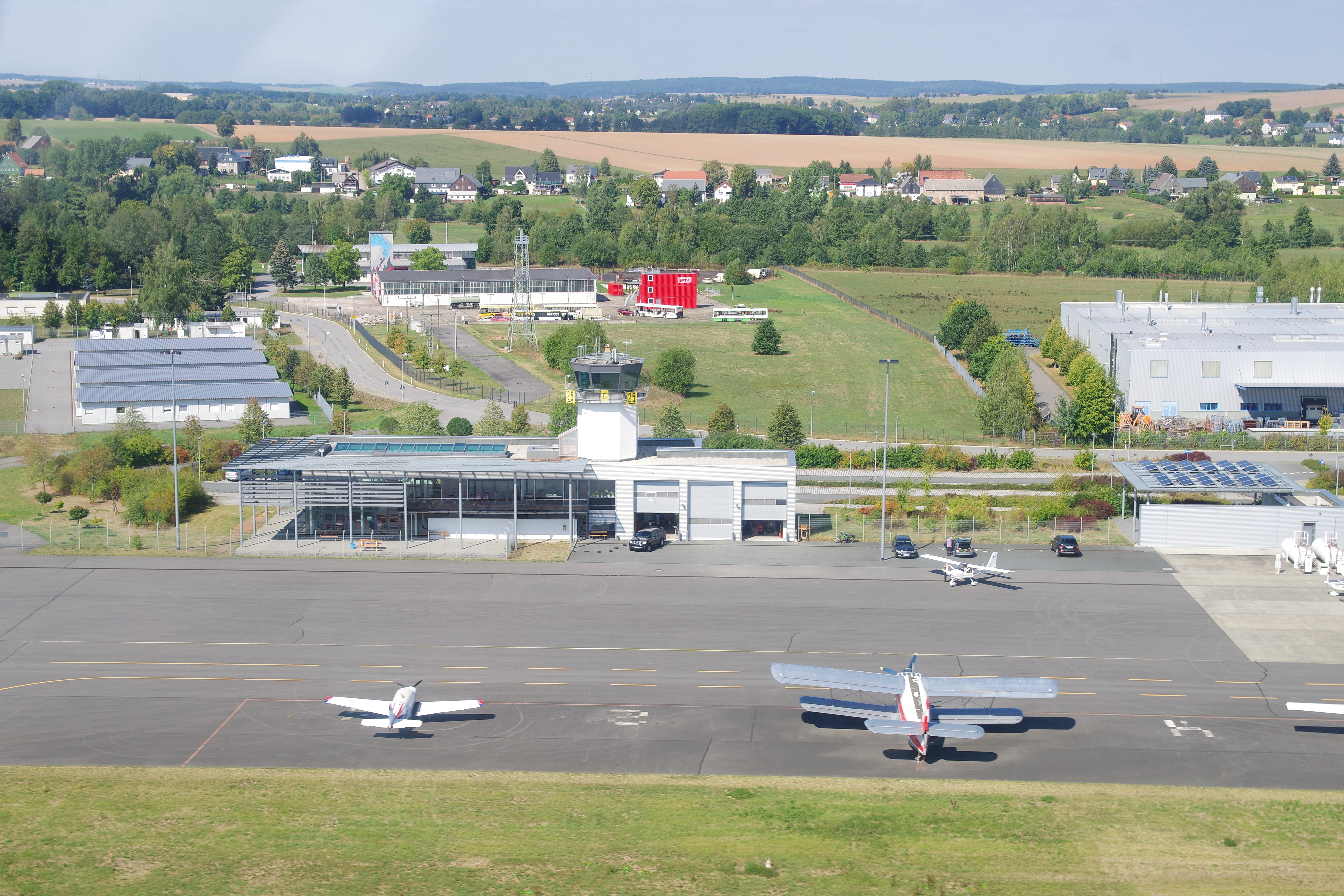 Flugplatz Chemnitz-Jahnsdorf